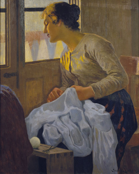 Catalan: L'esposa